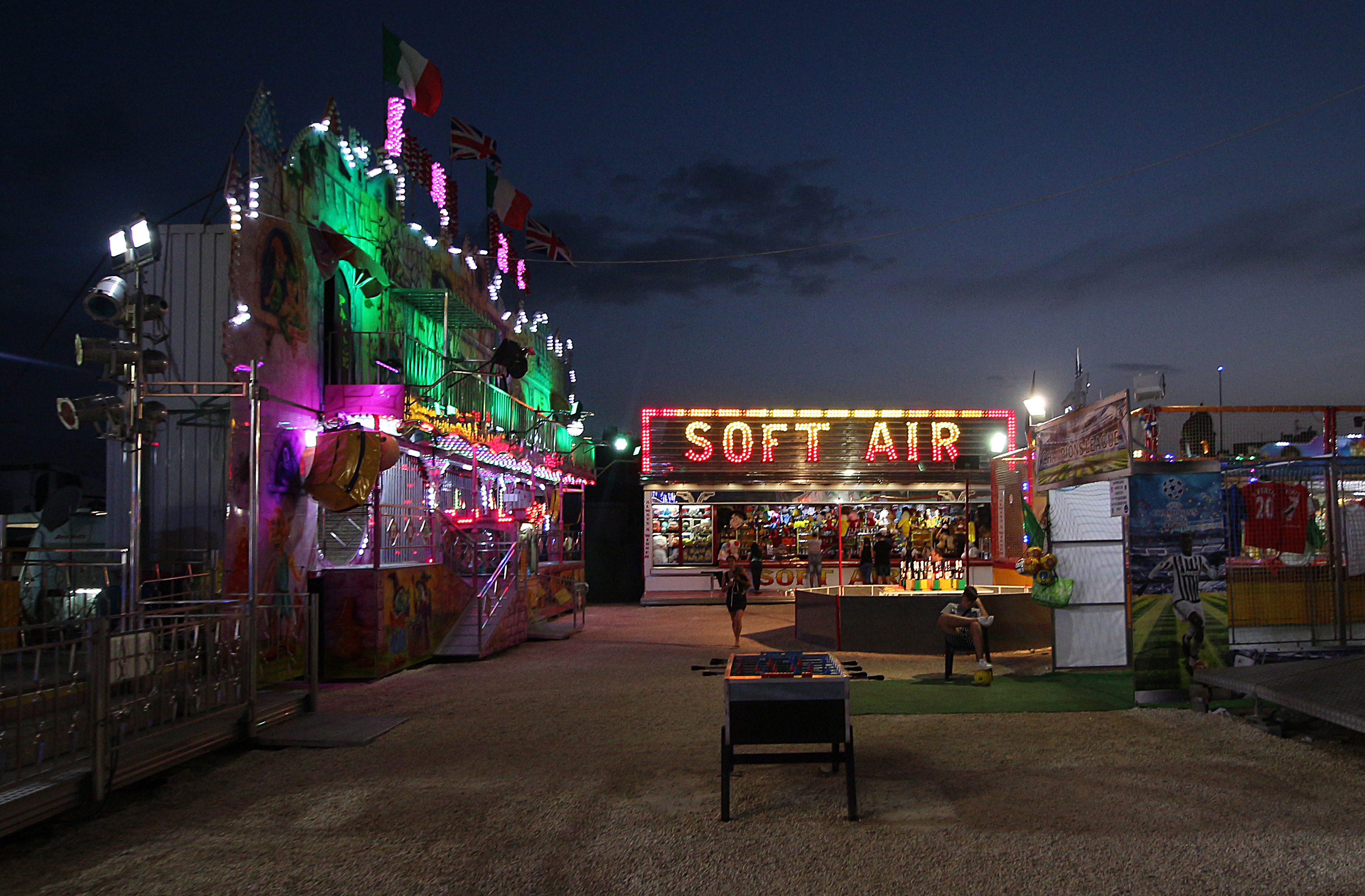 Bild från en nöjespark på Malta.